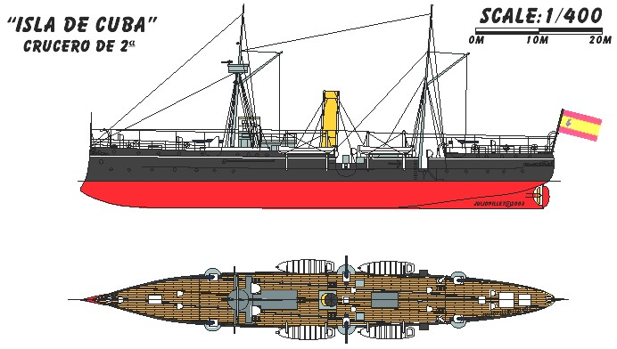 Схема крейсера "Исла де Куба" источник: de Cuba автор: неизвестен датировка: 20 в.